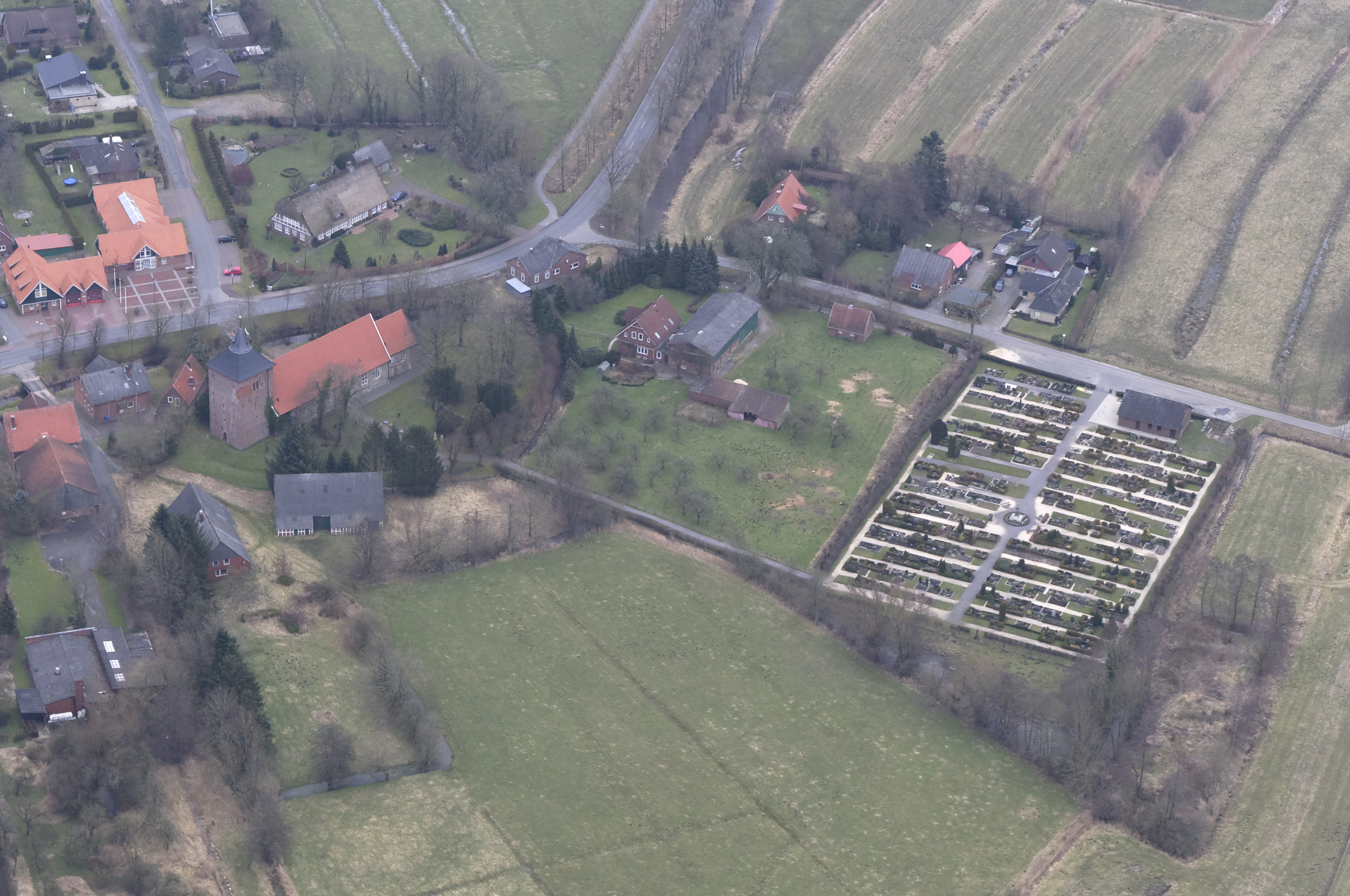 Luftaufnahme: St. Nicolai, Nordleda